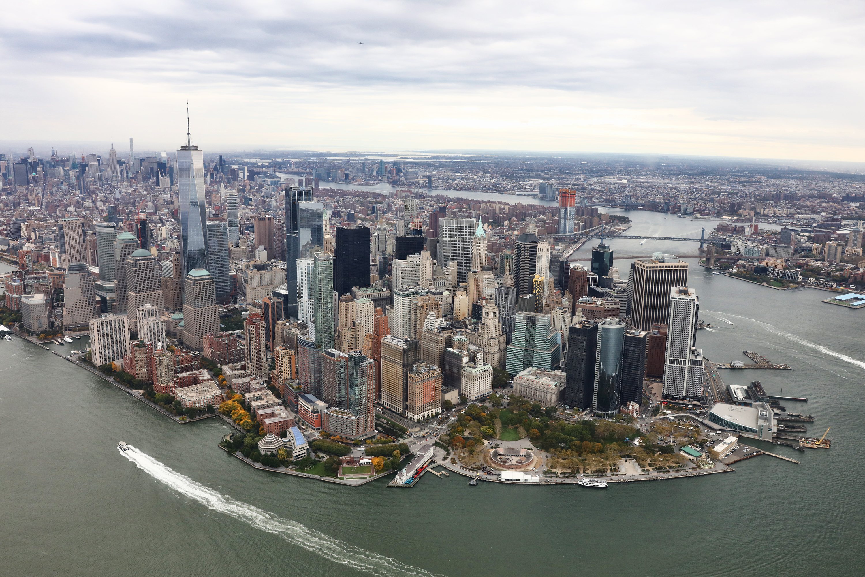 Manhattan, Luftbild